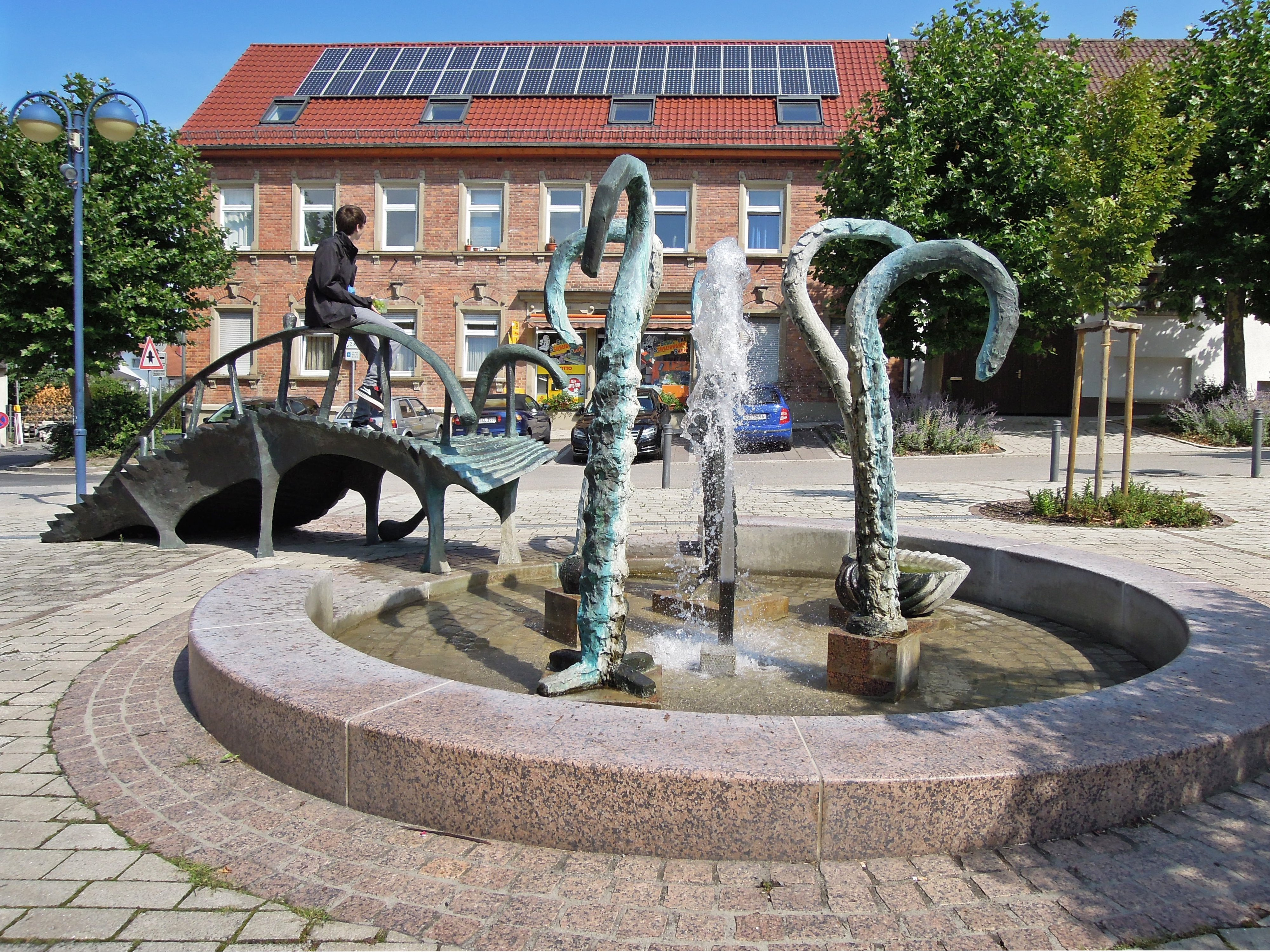 Dorfbrunnen in Bad Schönborn